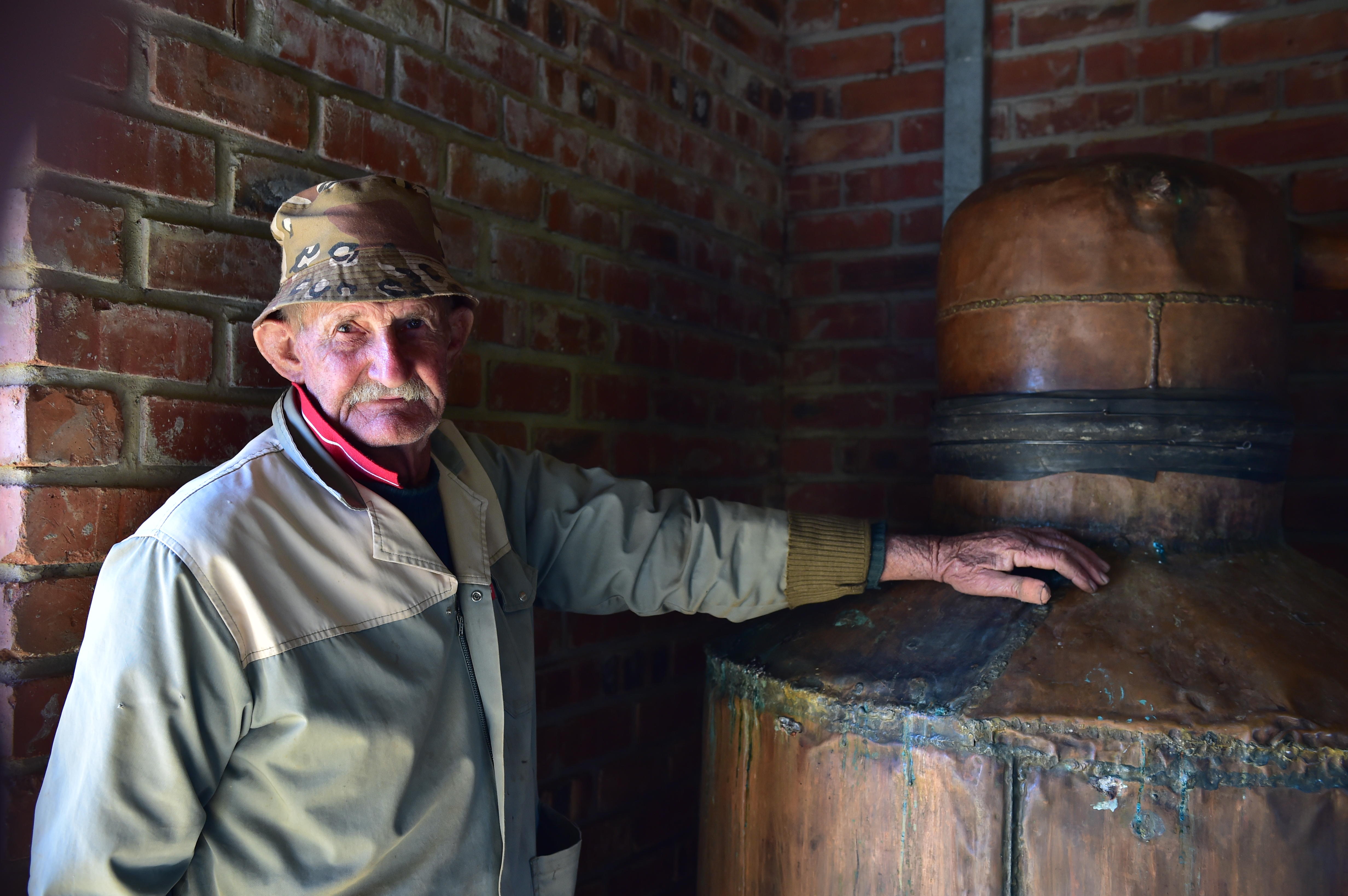 Vue du North West en Afrique du Sud.